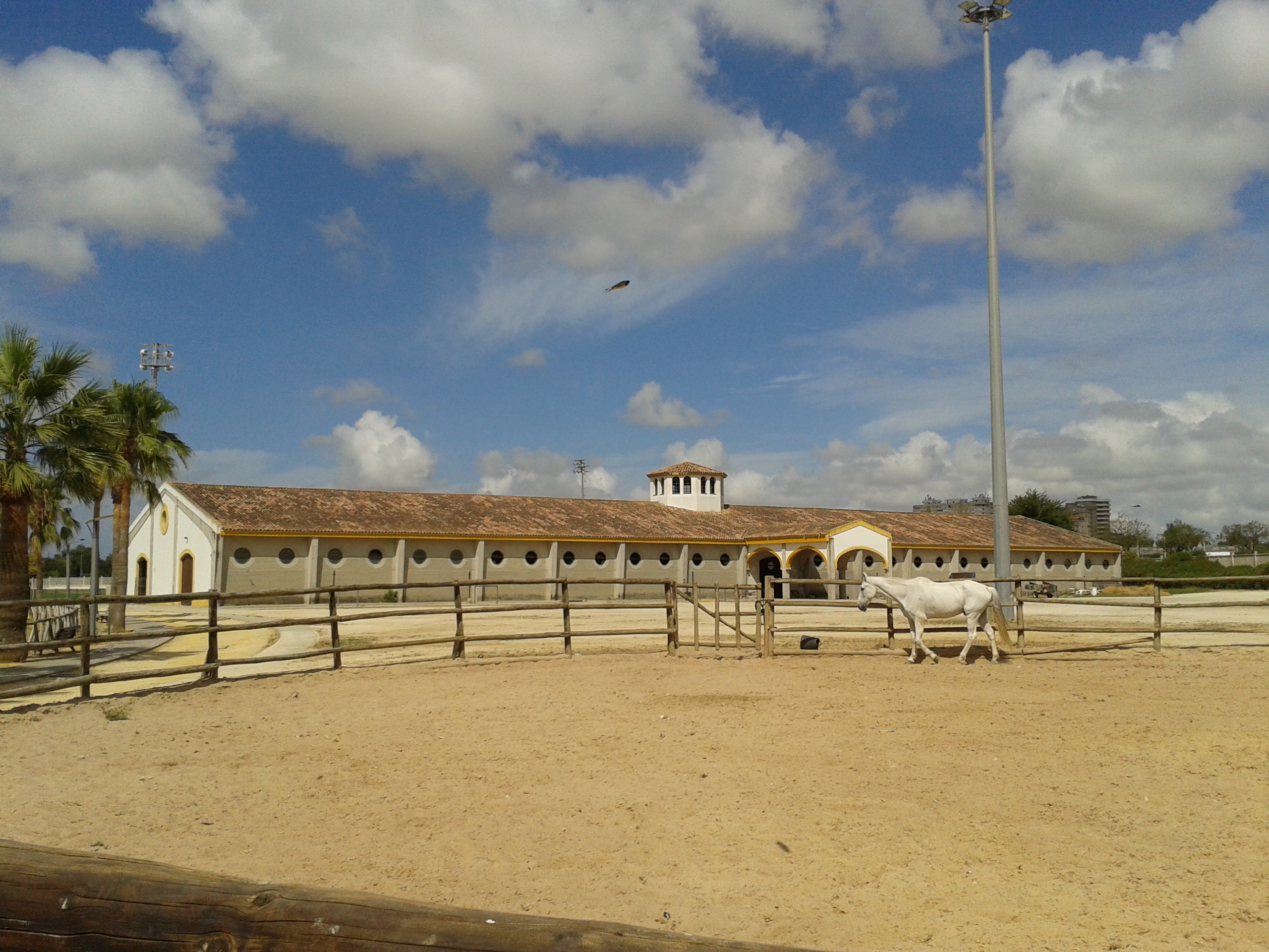 Zona hípica Chapín